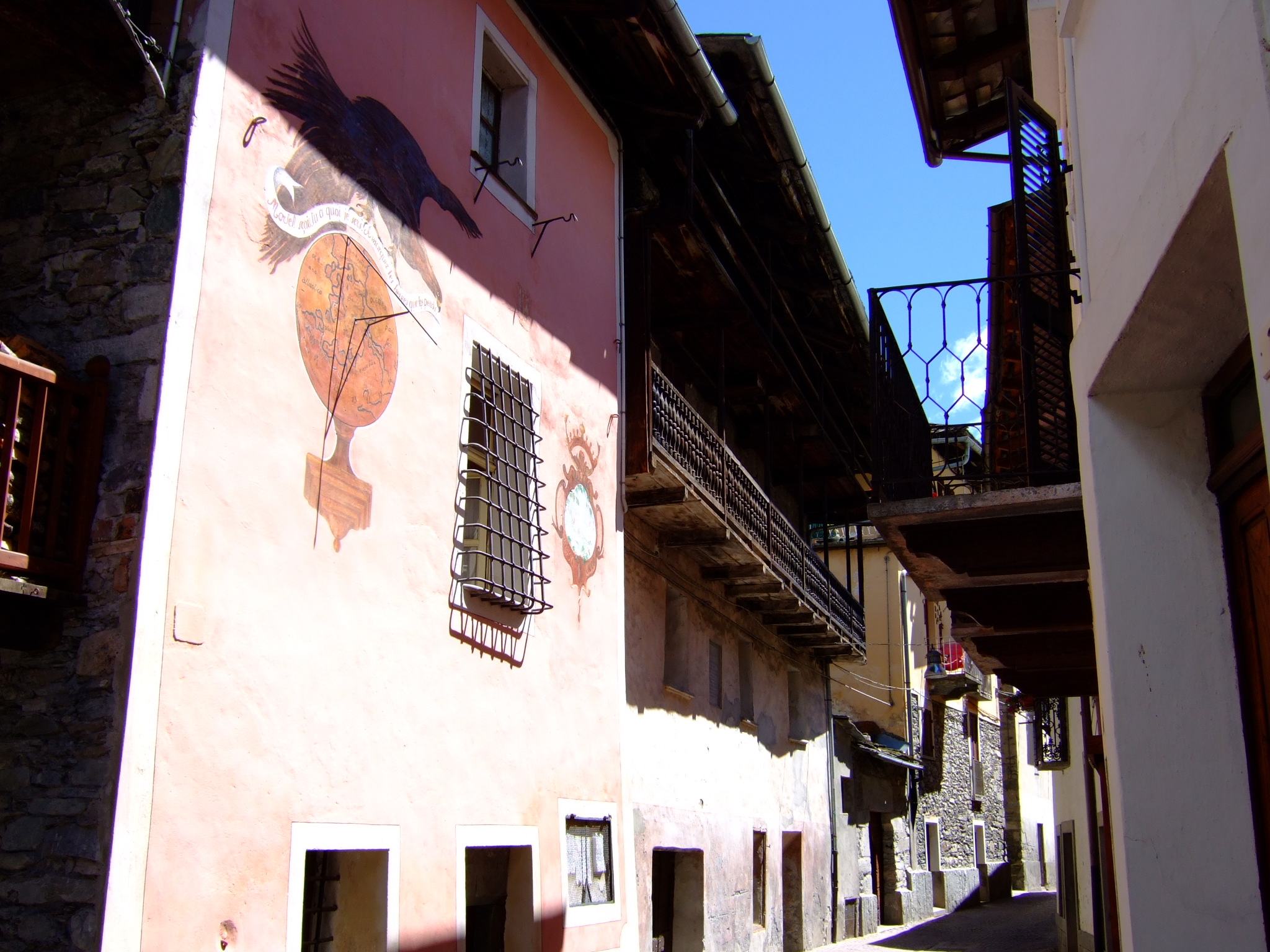 "Mortel sais-tu à quoi je sers ? À marquer les heures que tu perds". Cadran solaire à Casteldelfino (Piémont)